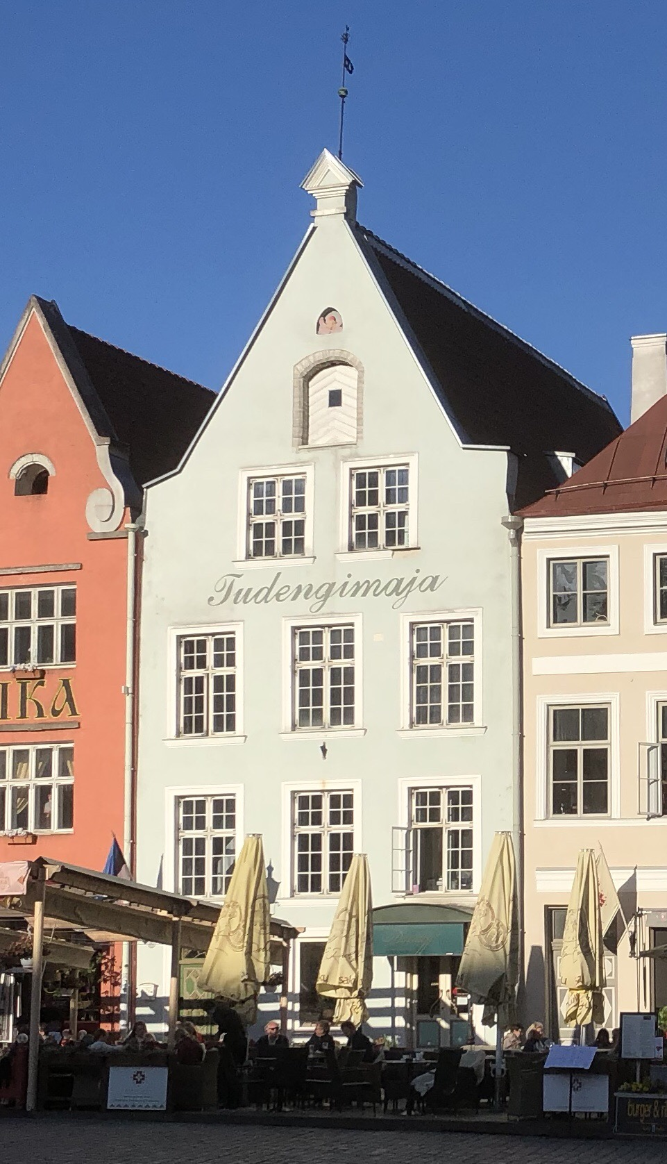 Haus Rathausplatz 16 im Jahr 2018